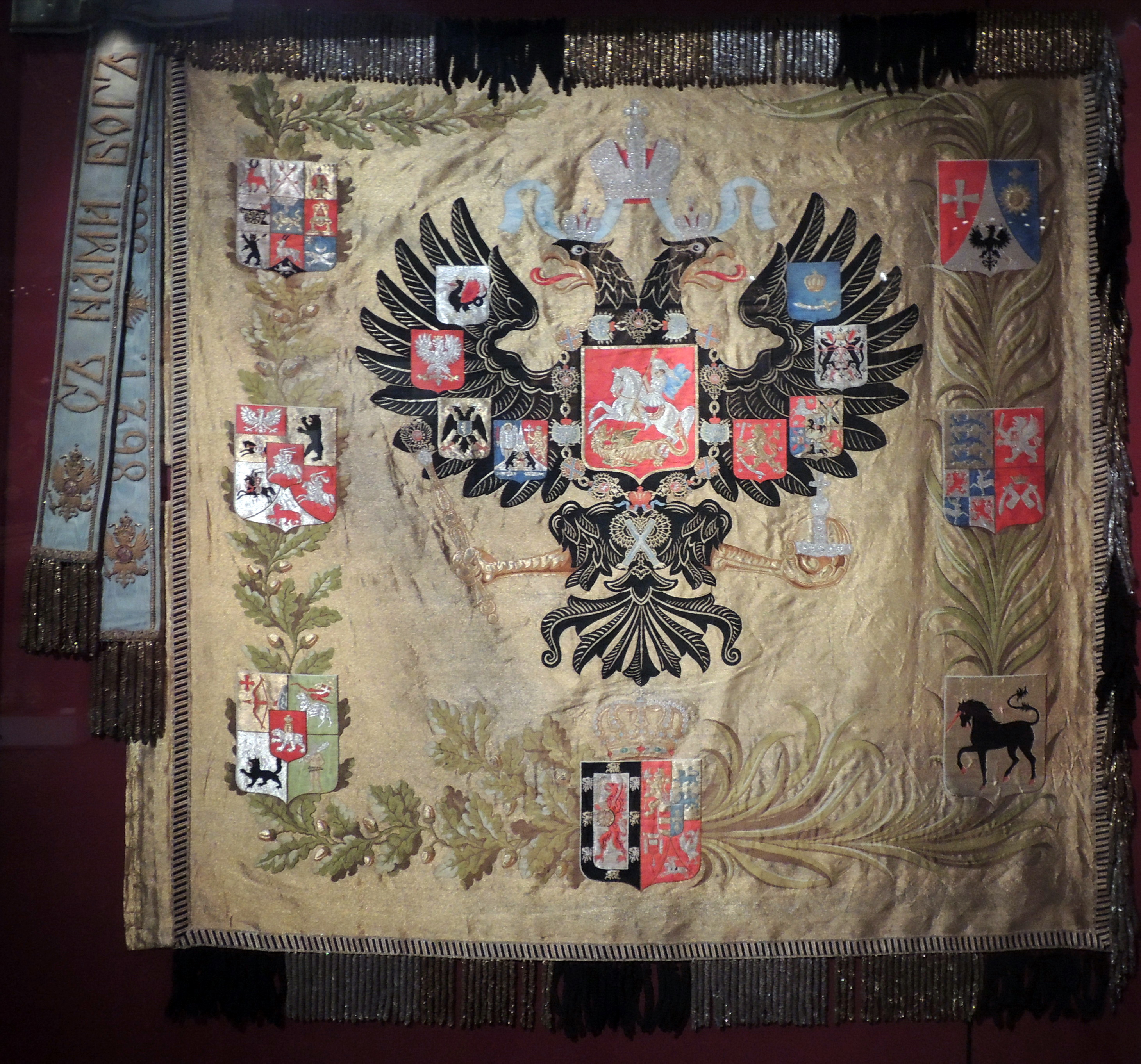 Государственное знамя. Москва, 1896. Полотнище "А. и В. Сапожниковы" Ленты - Мастерские Новодевичьего монастыря, 1895. Все -ММК